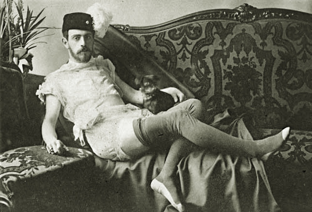 Francisco María de Borbón y Borbón, 1º duque de Marchena con un perro